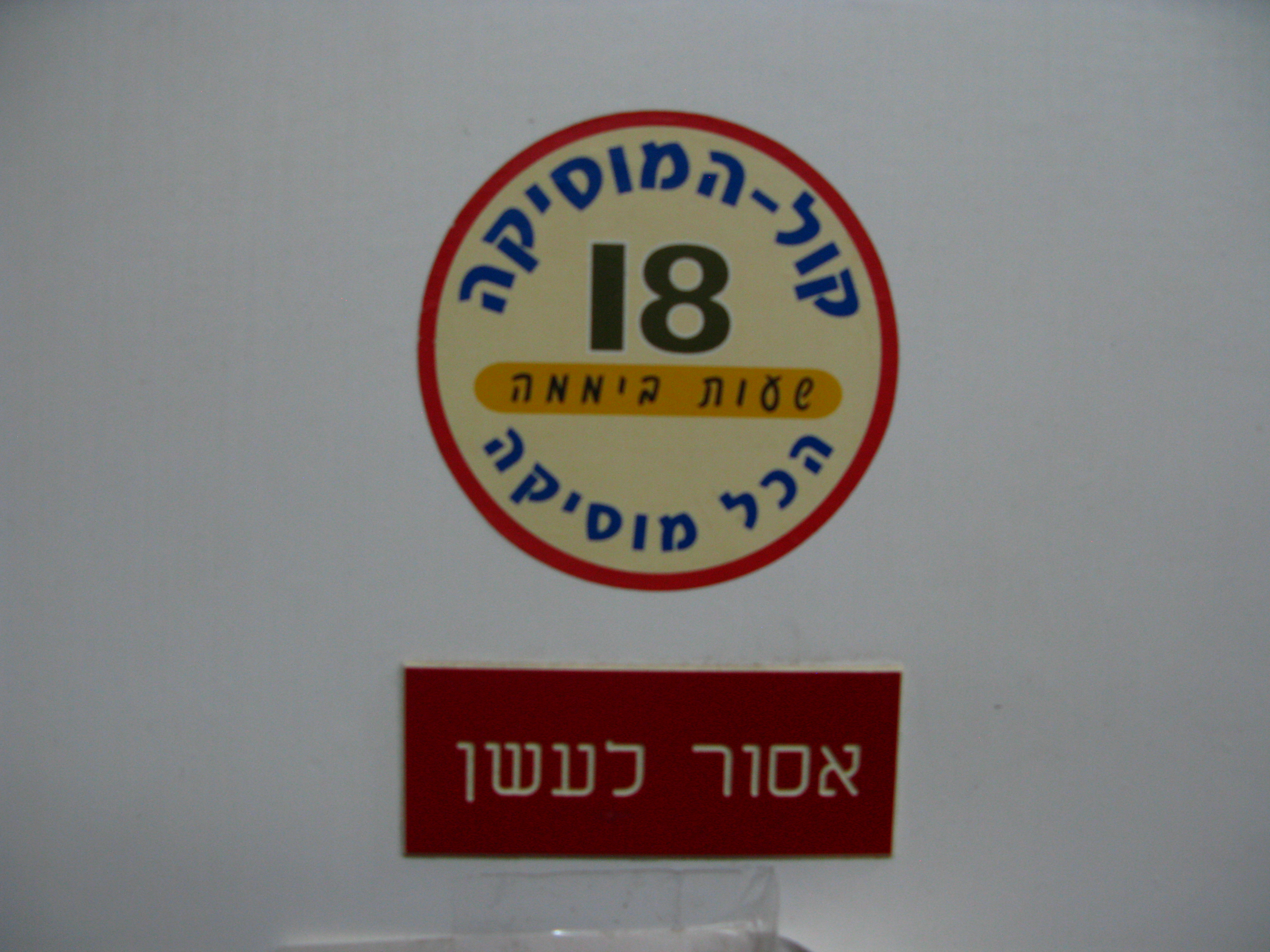 בניין קול ישראל ברחוב הלני המלכה בירושלים, משמש את תחנת הרדיו "קול ישראל" מאז ימי הרדיו המנדטורי ב-1939, ולסגירת רשות השידור.